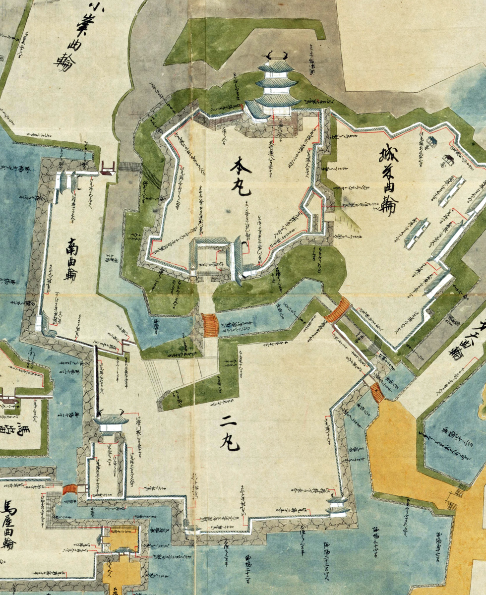 相州小田原城図の一部